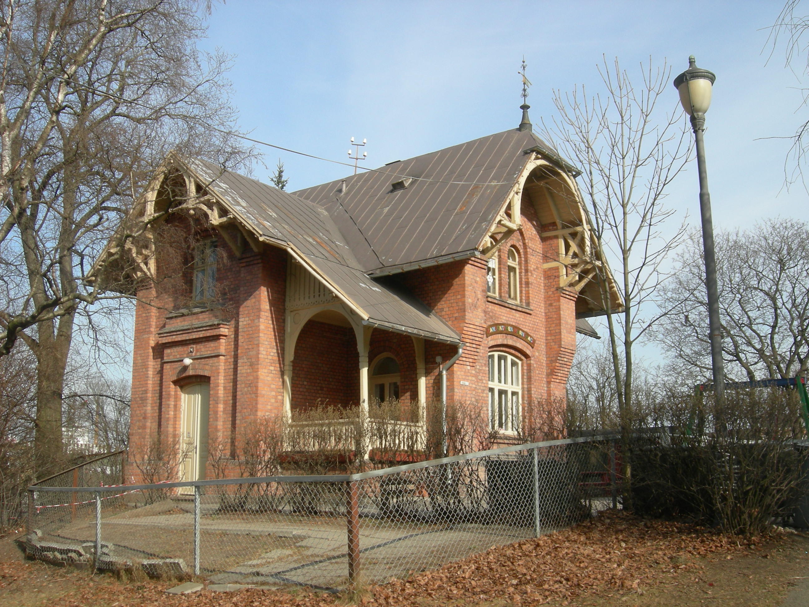 From Kampen park, Oslo, Norway